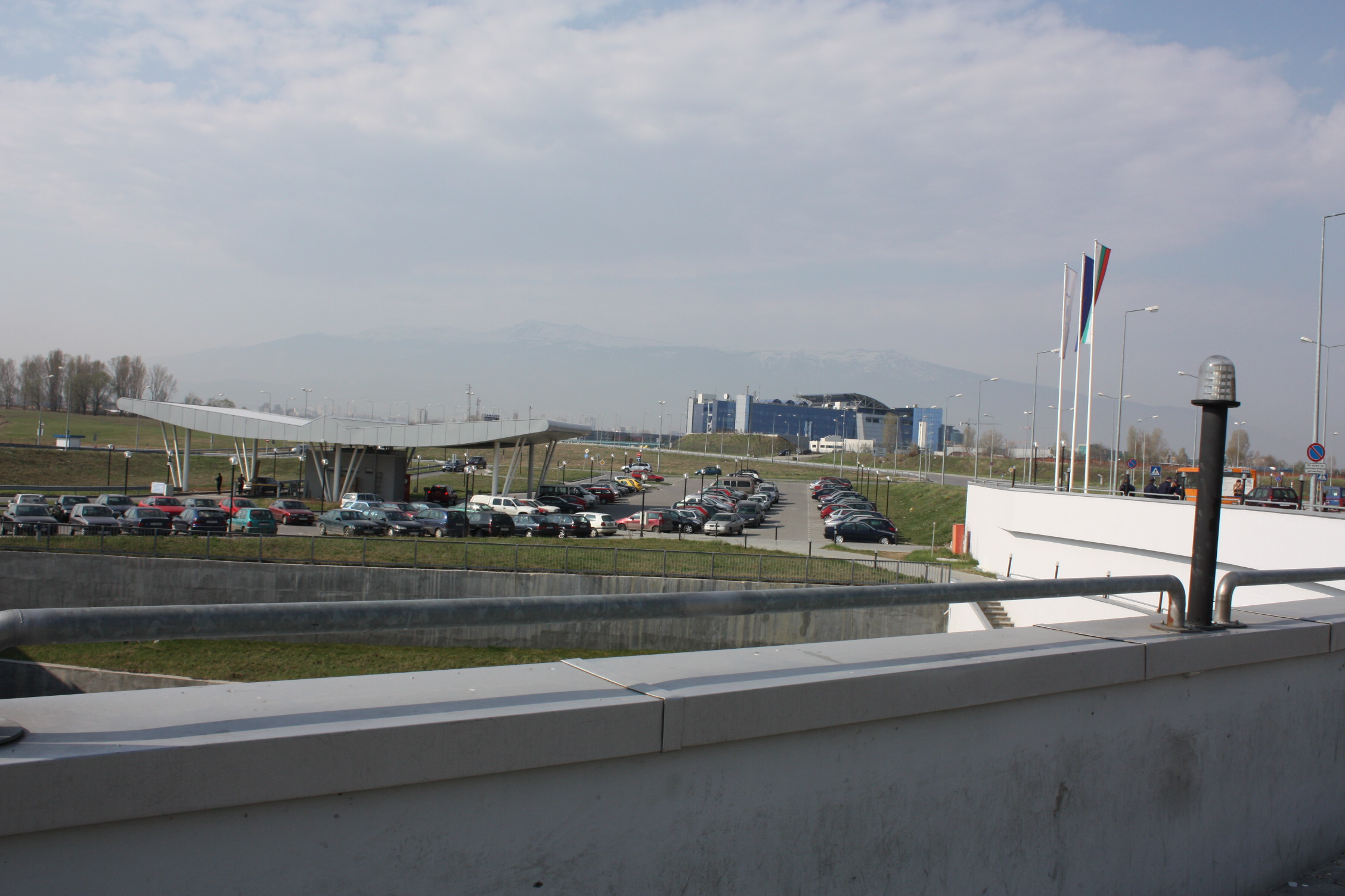 Sofia Airport, Bulgaria